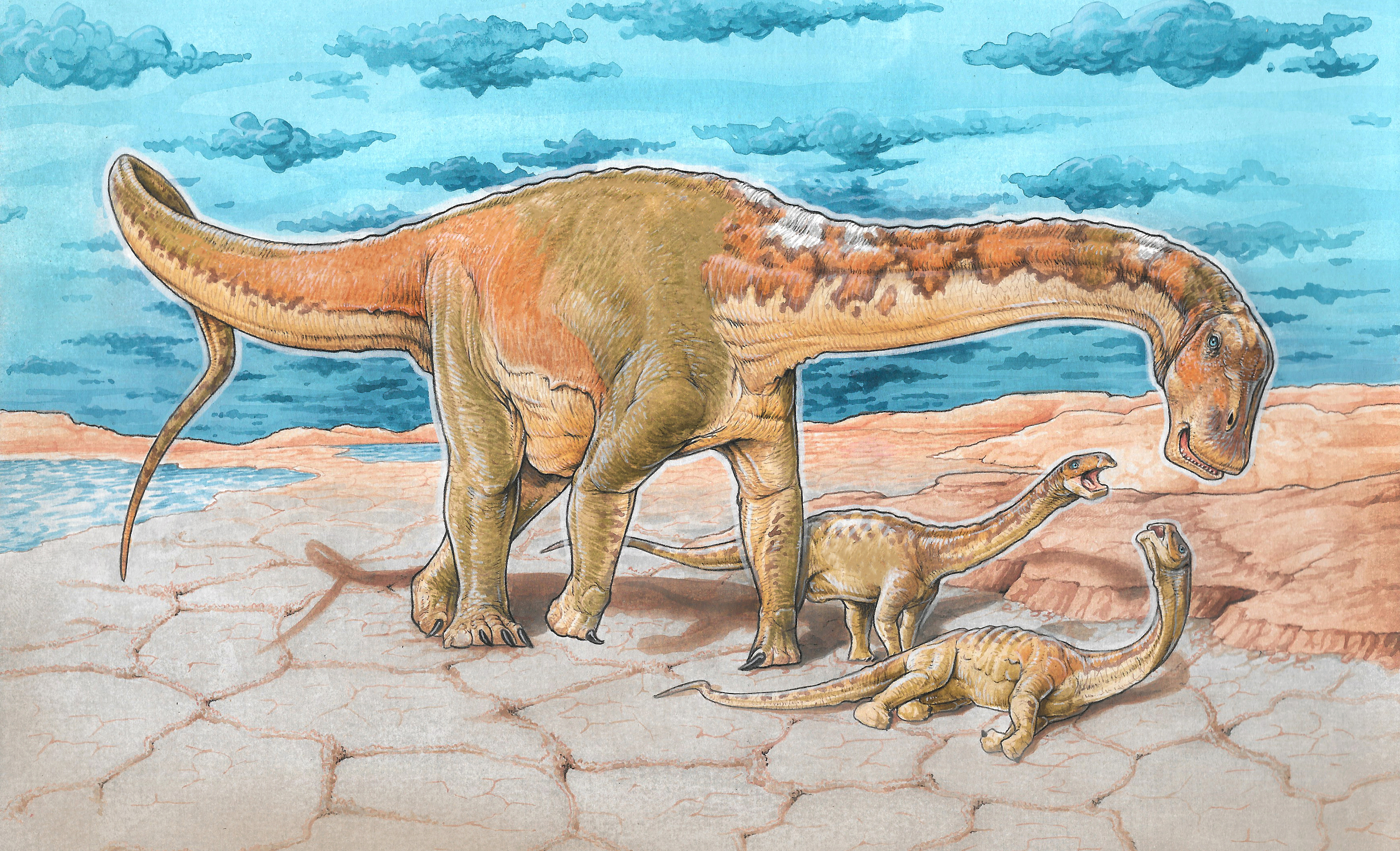 Reconstrucción de Lavocatisaurus, ejemplar adulto y dos juveniles en el Cretácico Inferior de la Provincia de Neuquén. Ilustración por Gabriel Lio